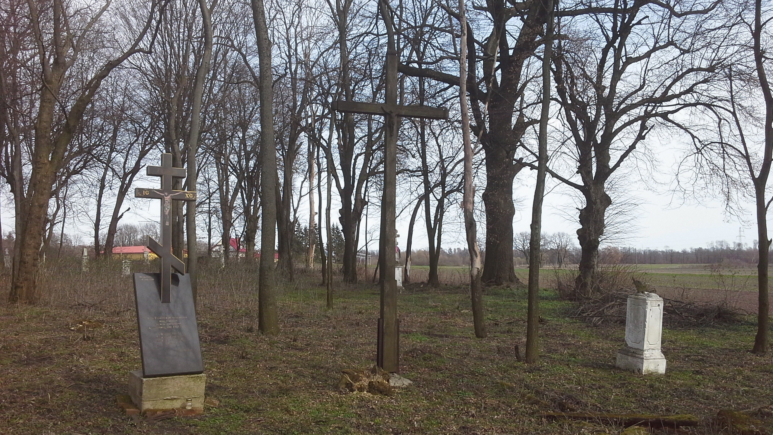 Cmentarz prawosławny w Wereszynie. Pomnik zmarłych i zabitych podczas II wojny światowej mieszkańców wsi